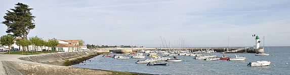 Avant-port de La Flotte, côte Nord de l'îŽle de Ré - 2005 Photo issue de ma banque d'images